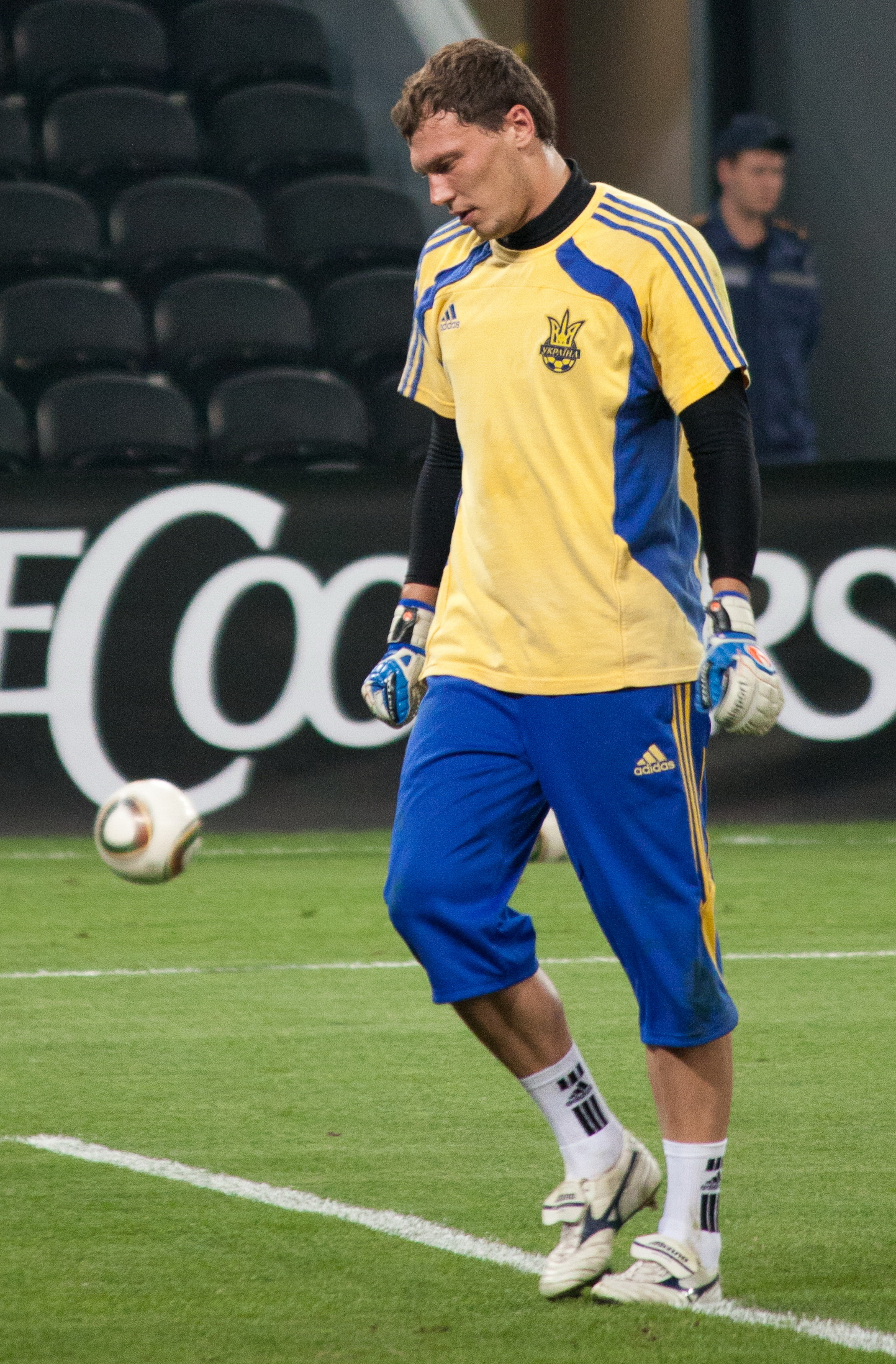 Перед матчем Украина-Голландия